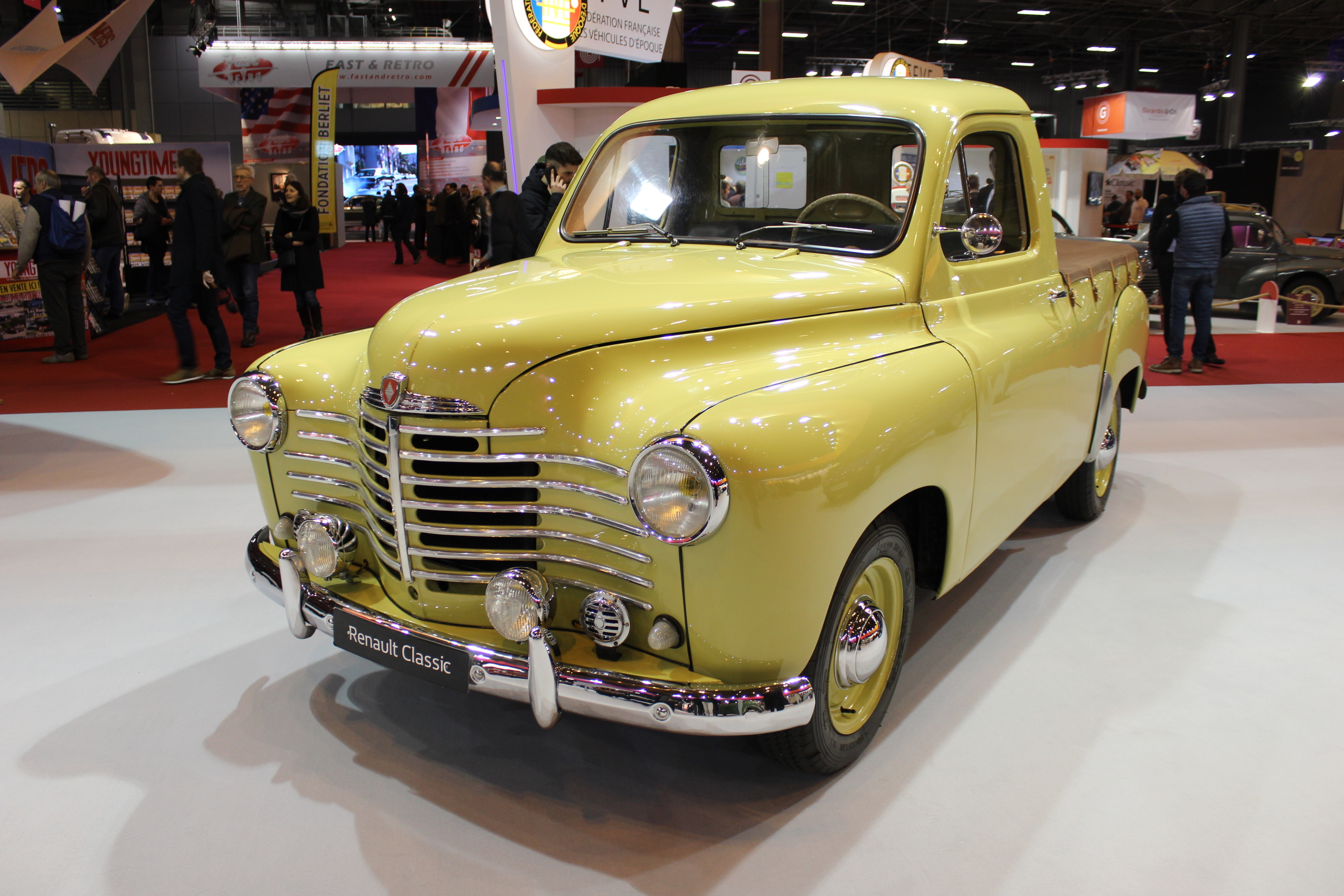 Renault Colorale Tous Terrains Pick-up Code 2095 (1954)Rétromobile 2018